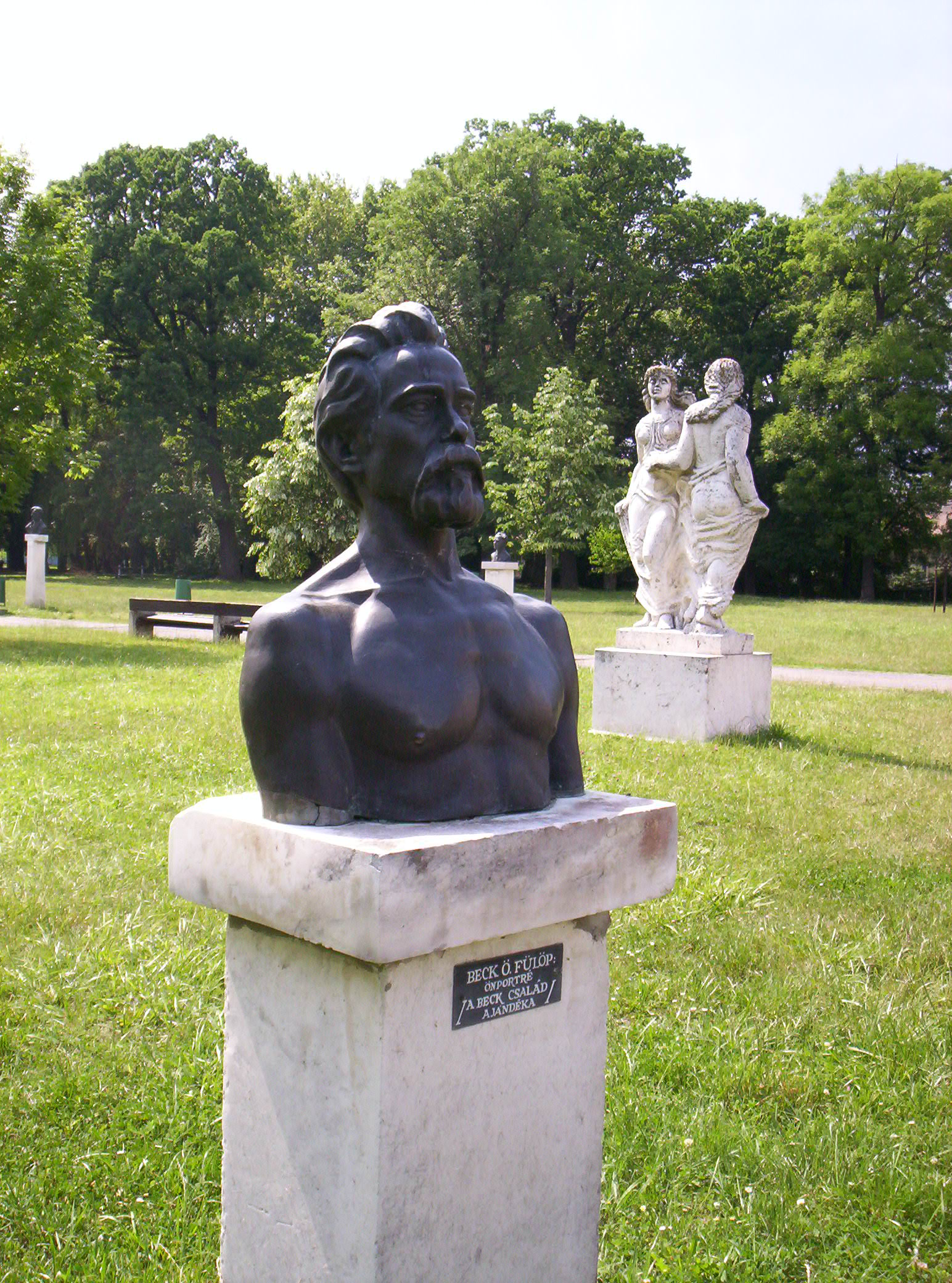 Fülöp Beck Ö's self-portrait in Köztársaság Liget, Pápa, Hungary.Beck Ö. Fülöp önportréja a pápai Köztársaság Ligetben.